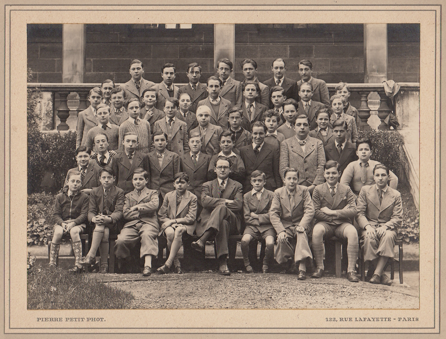 Photo de classe du lycée Rollin, vers 1945. Cliché : 16 x 22 cm. Photo studio Pierre Petit, Paris. (5ème rang, 3ème à partir de la droite : François Truffaut. Collection privée.